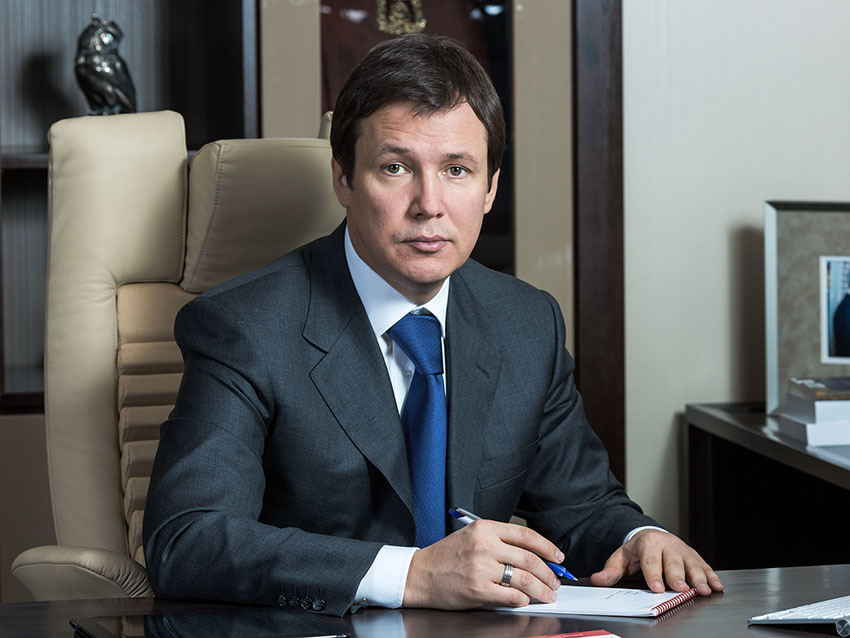 Абрамов, Сергей Борисович